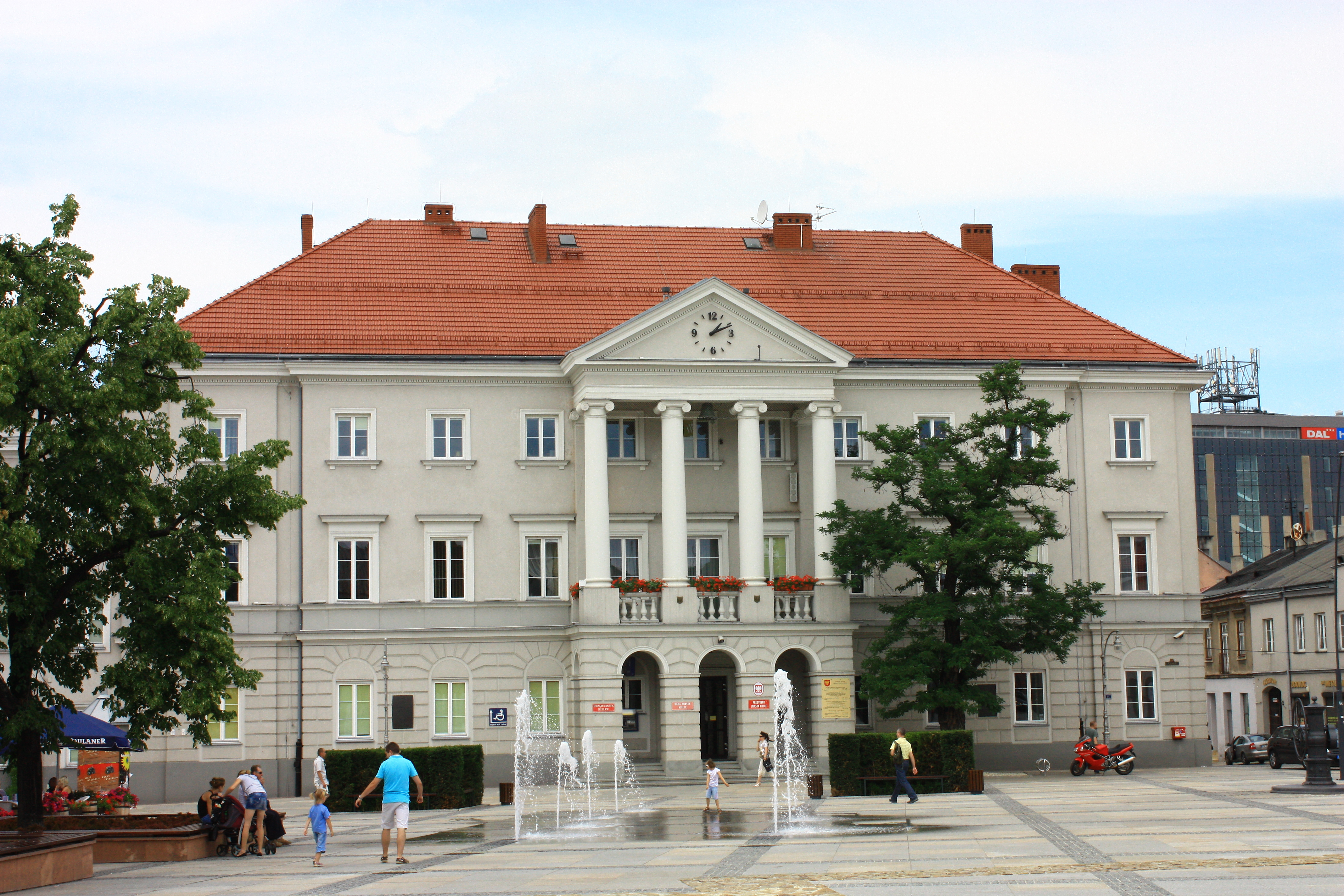 Kielce, Rynek z wylotami ulic: Piotrkowska, Kozia, Warszawska, Bodzentyńska, Mała i Leśna, XIV, XX w.